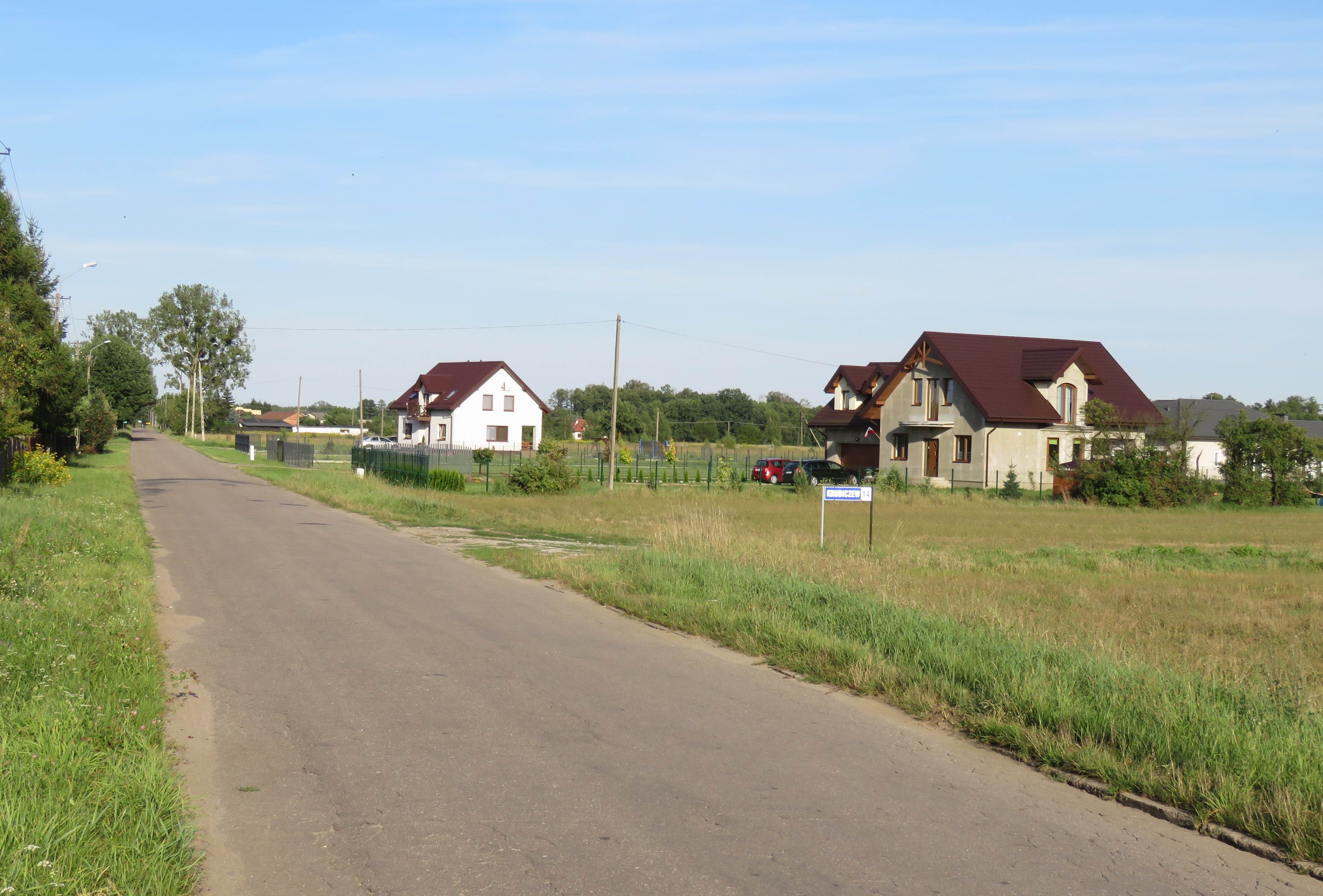 KRUBICZEW